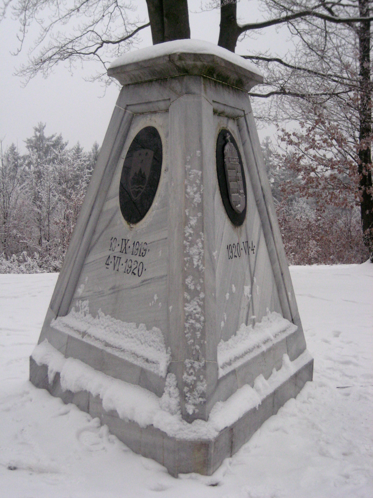 Tromejnik, 3-national-border site (Slovenia/Austria/Hungary) * A tromejniki hármashatár (Magyar/Szlovén/Osztrák)